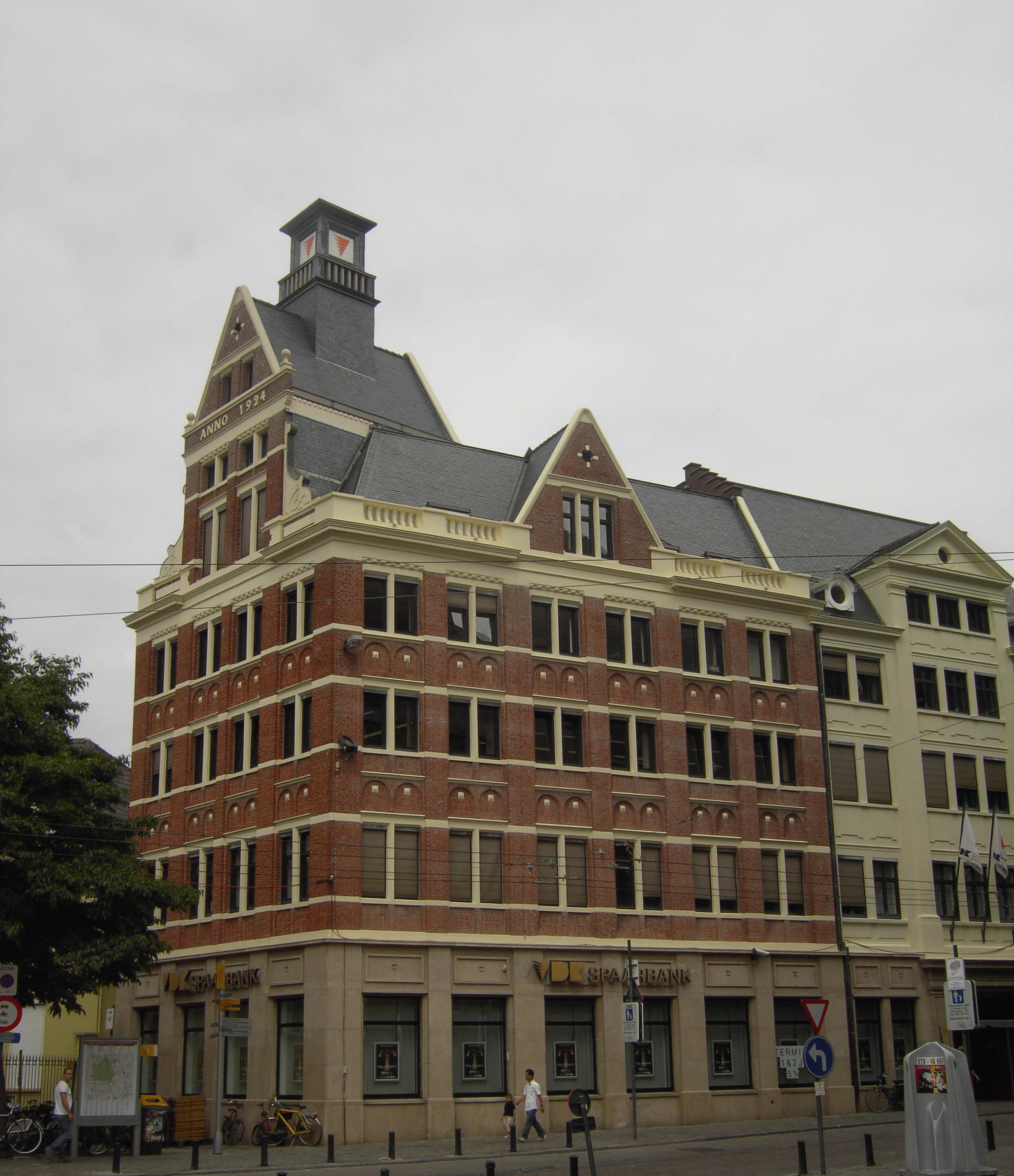 VDK - Bank - Hoofdkantoor - Sint-Michielsplein - Gent - België